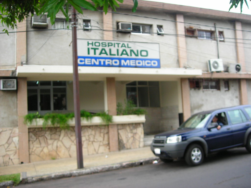 Italiano